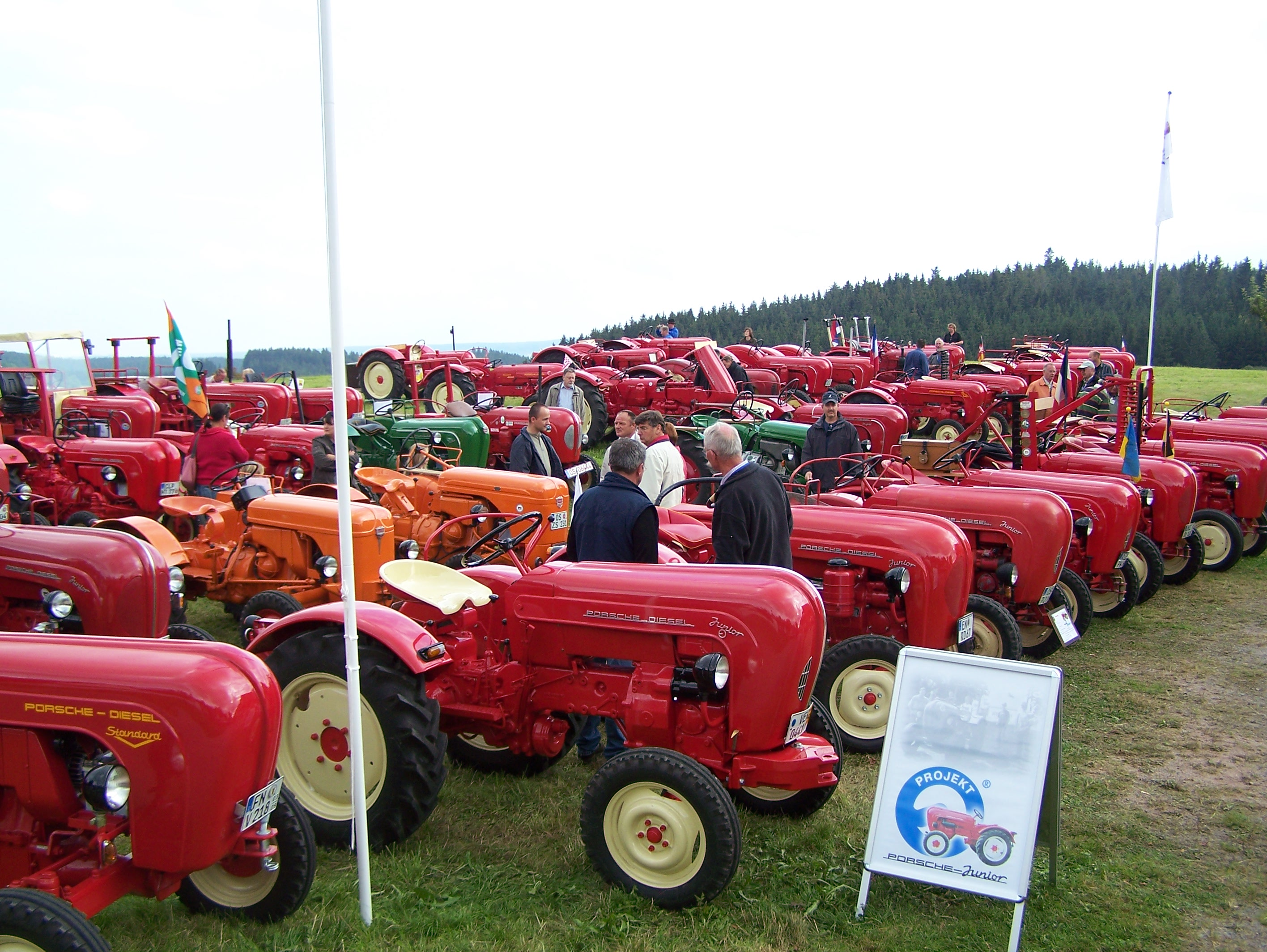 Porsche-Diesel-Traktoren aufgenommen beim Porsche-Oldtimer-Treffen in Saig, Lenzkirch, Baden-Wüttemberg, Deutschland